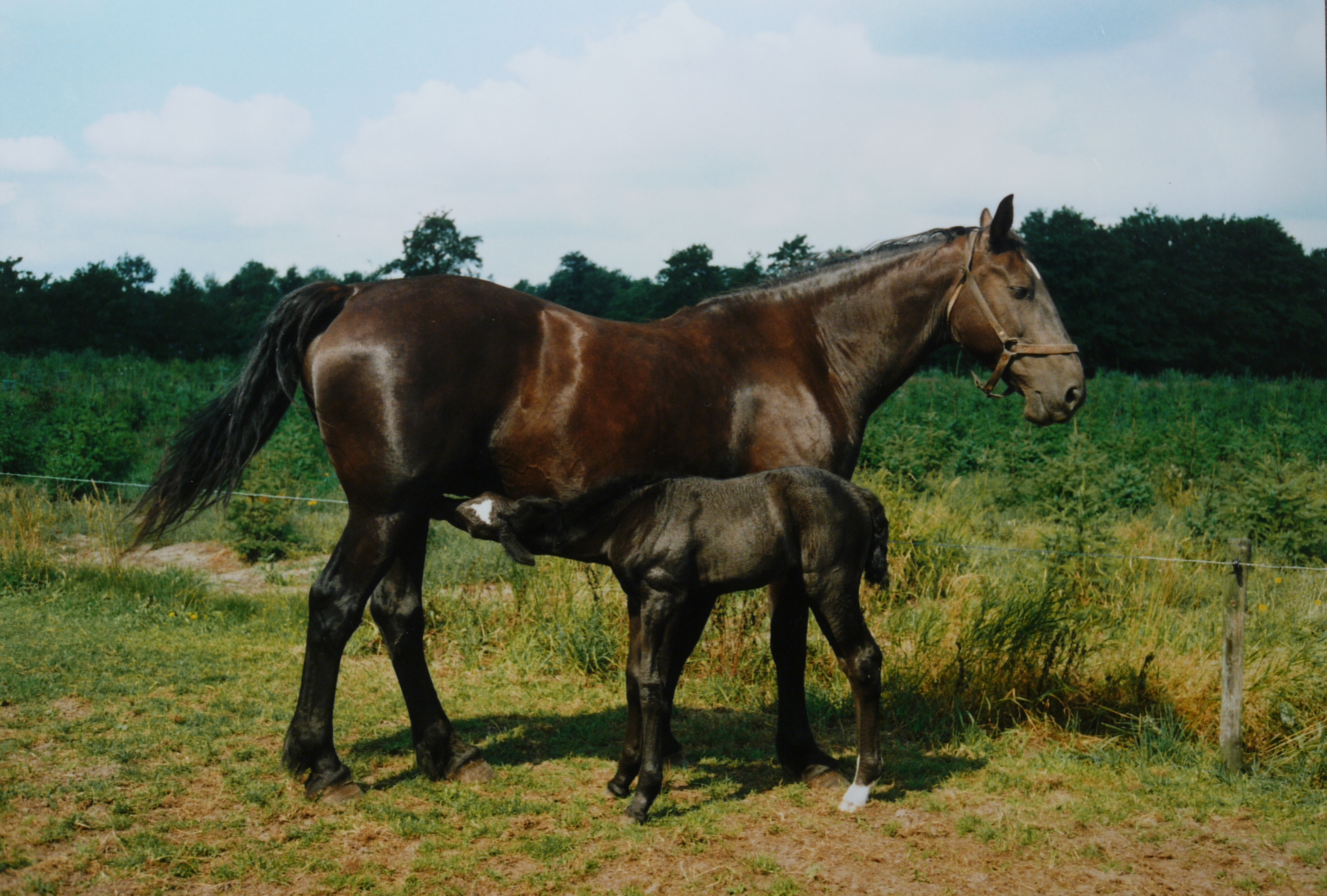 Groninger Paard. Merrie met veulen